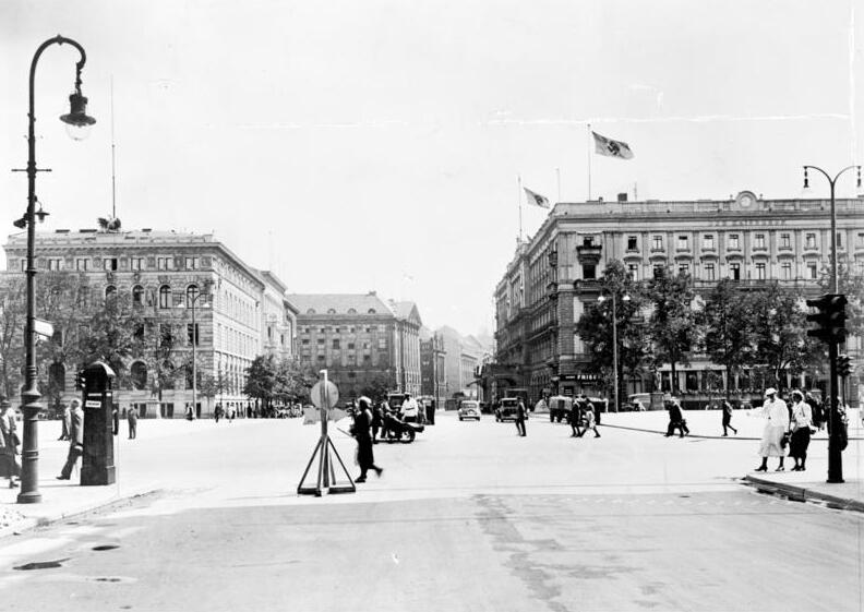 Berlin, Wilhelmplatz, Hotel "Kaiserhof" ADN-Bildarchiv Berlin 1937 Blick vom Wilhelmplatz nach Osten in die Mohrenstrasse; rechts das Hotel "Kaiserhof". Aufnahme: Schwahn